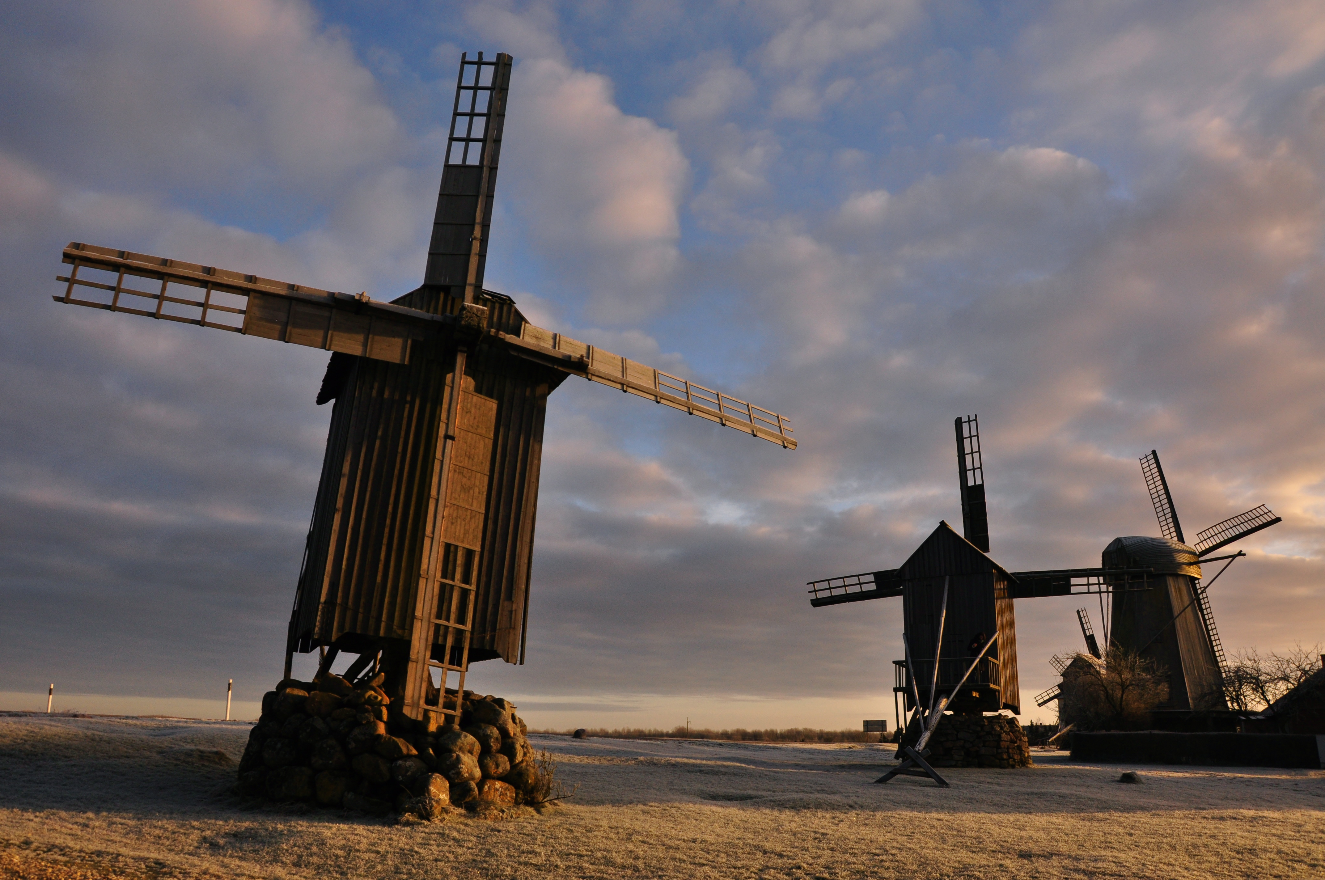 Windmills at Angla